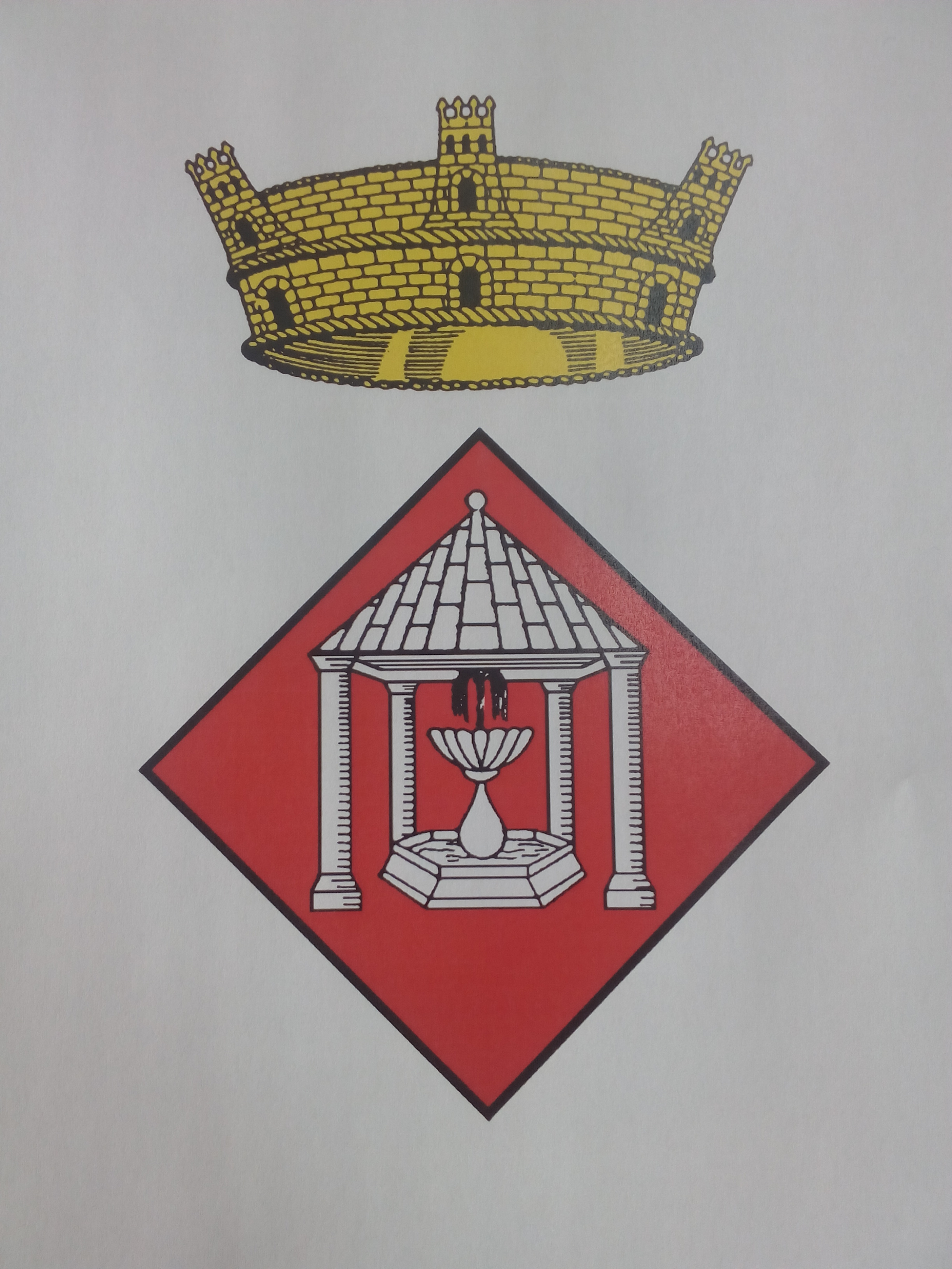 Escut Ajuntament Fontcoberta